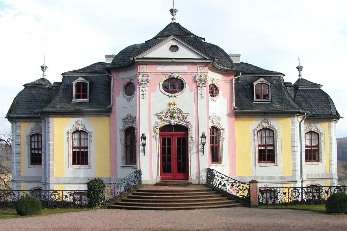 Kulturdenkmal Dornburg Saale Rokokoschloss Westansicht Thüringen Foto Wolfgang Pehlemann IMG 0434